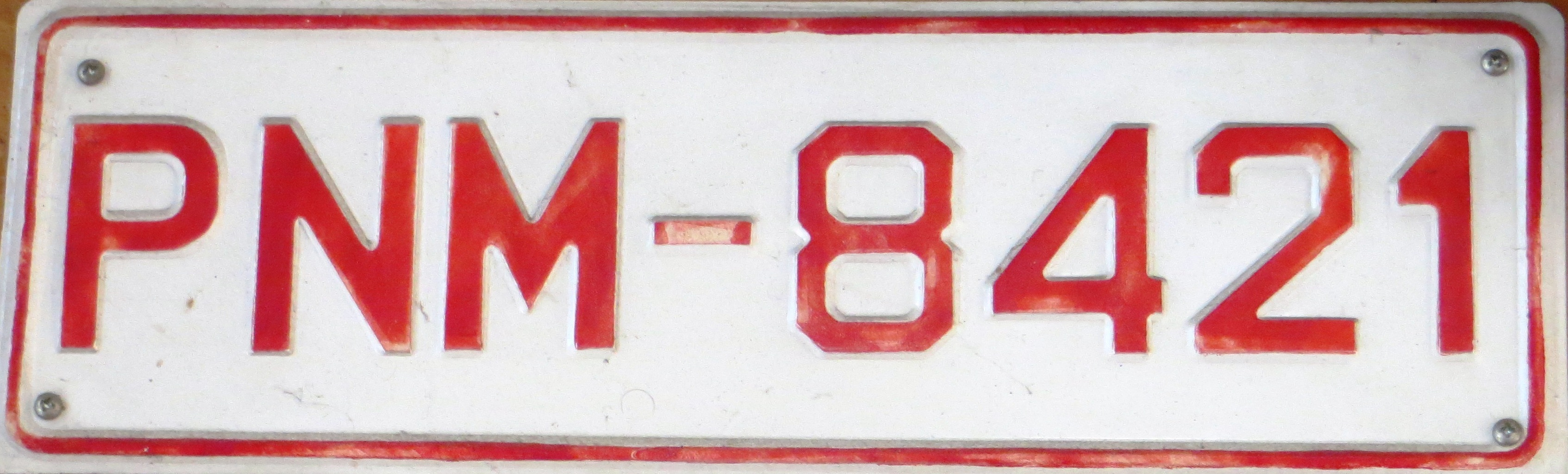 Grieks kentekenplaat concessionary